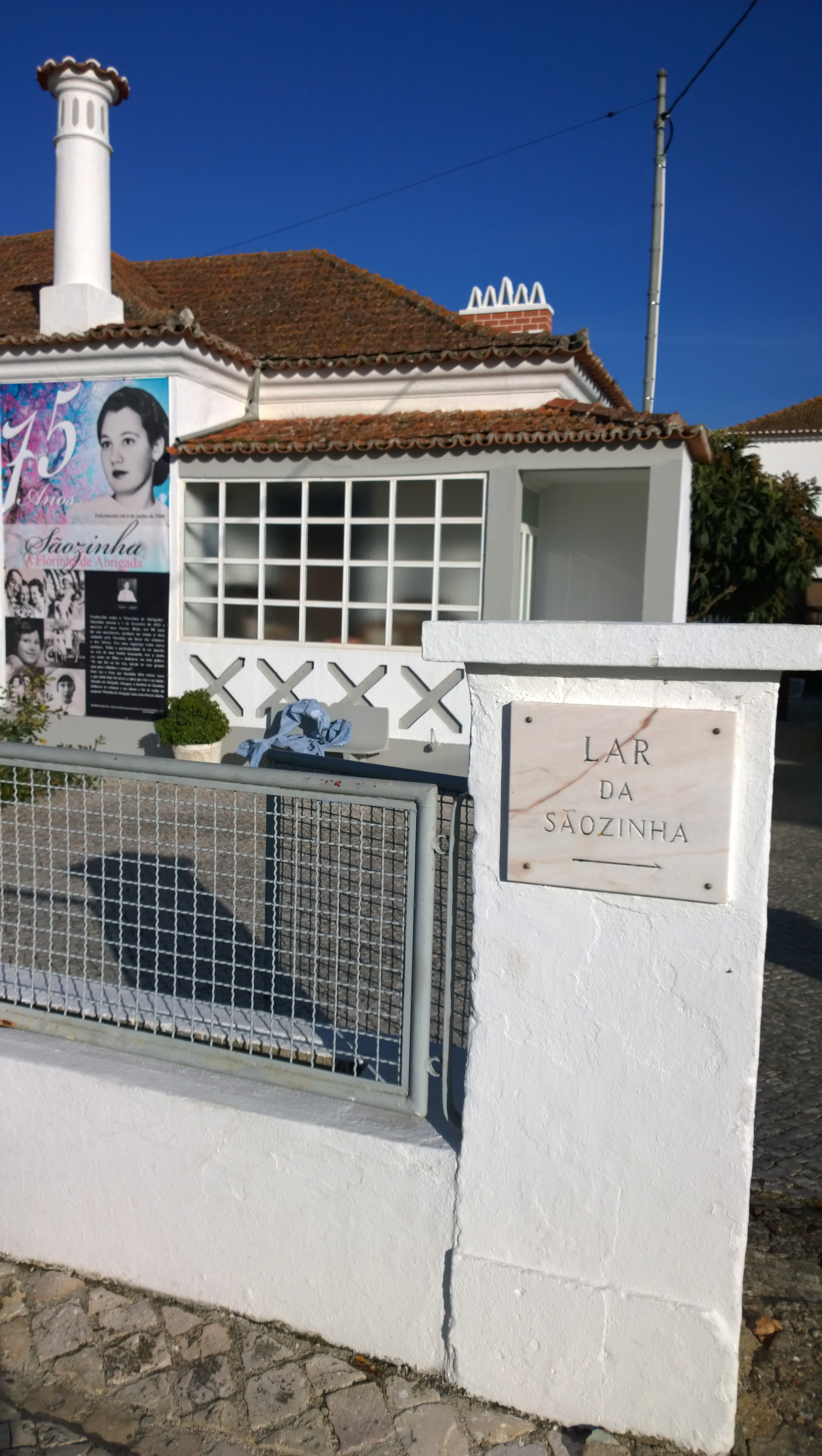 Lar da Sãozinha (Entrada)